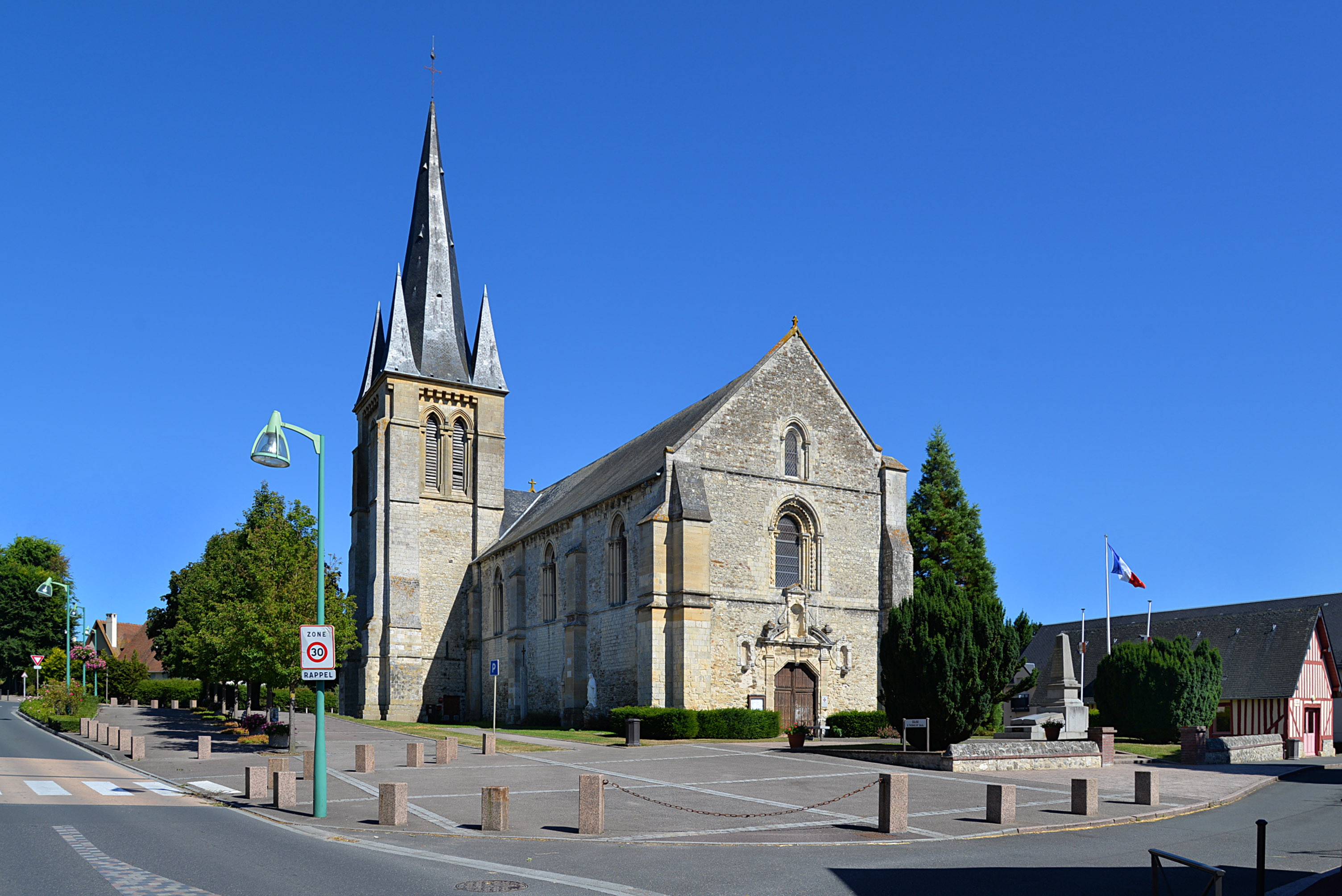 Touques (Calvados)